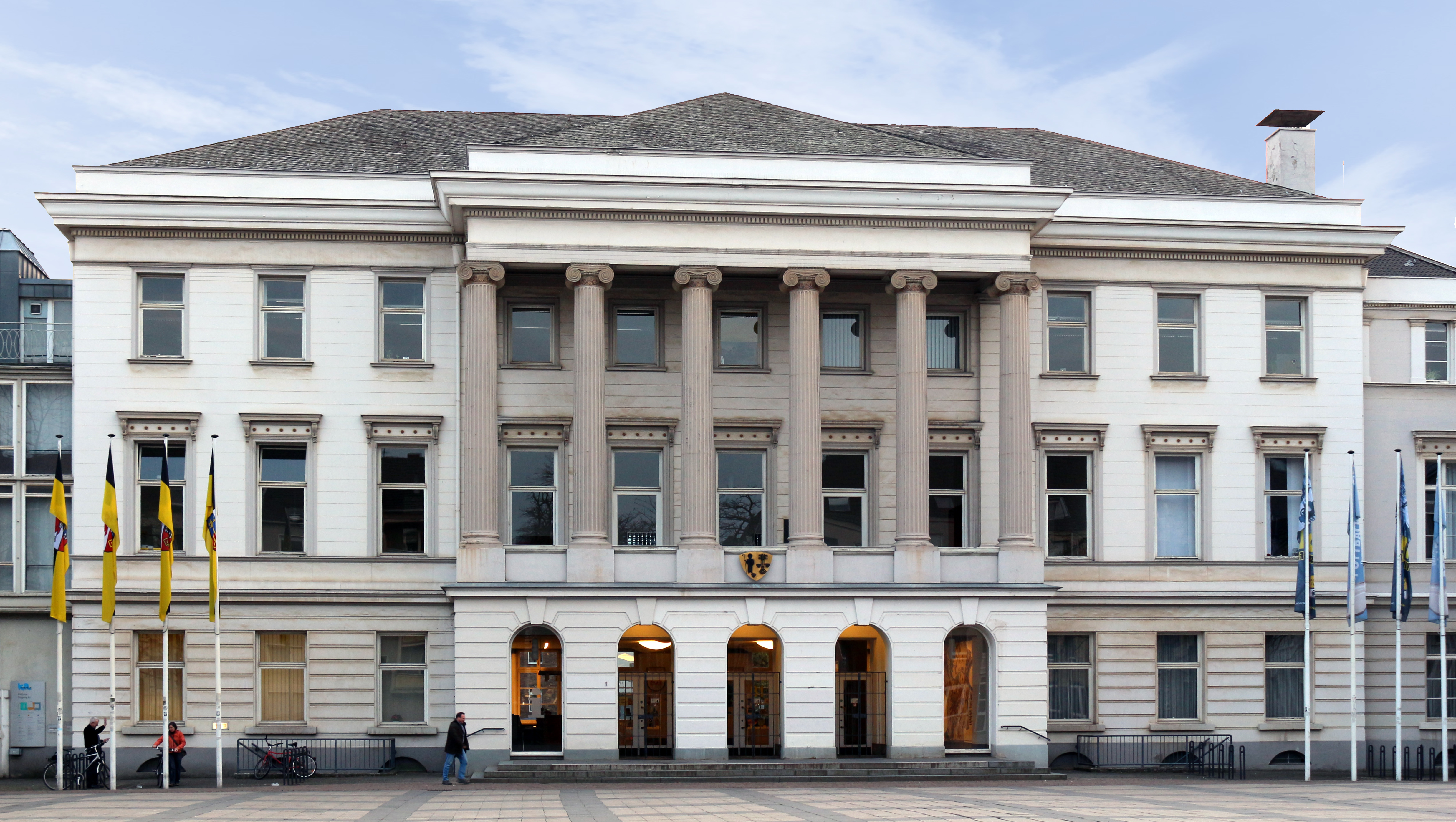 Das Stadtschloss der Familie von der Leyen in Krefeld, heute Rathaus